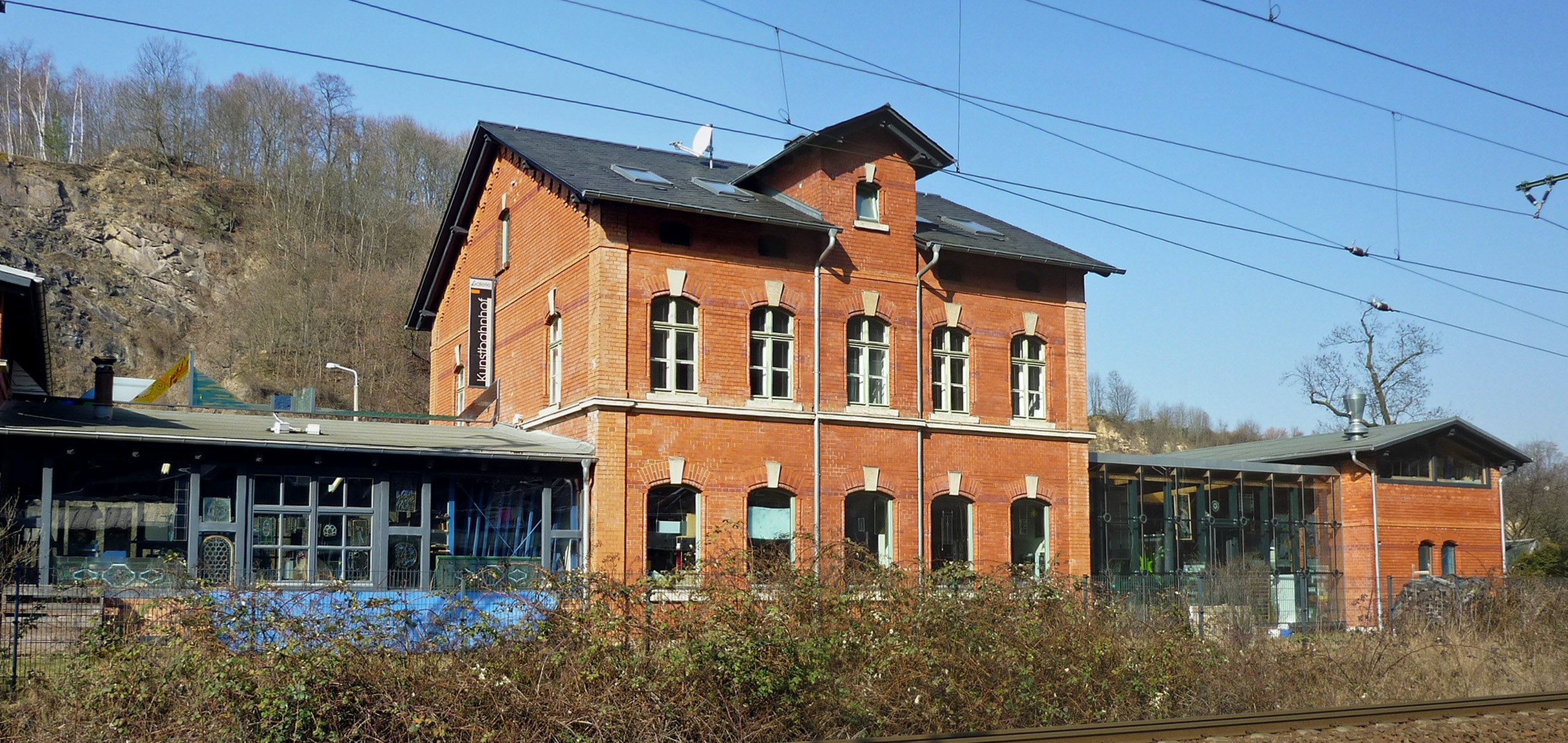 Der alte Bahnhof Dresden-Plauen an der ehem. Felsenkellerbrauerei (Blick von der Gleisseite)